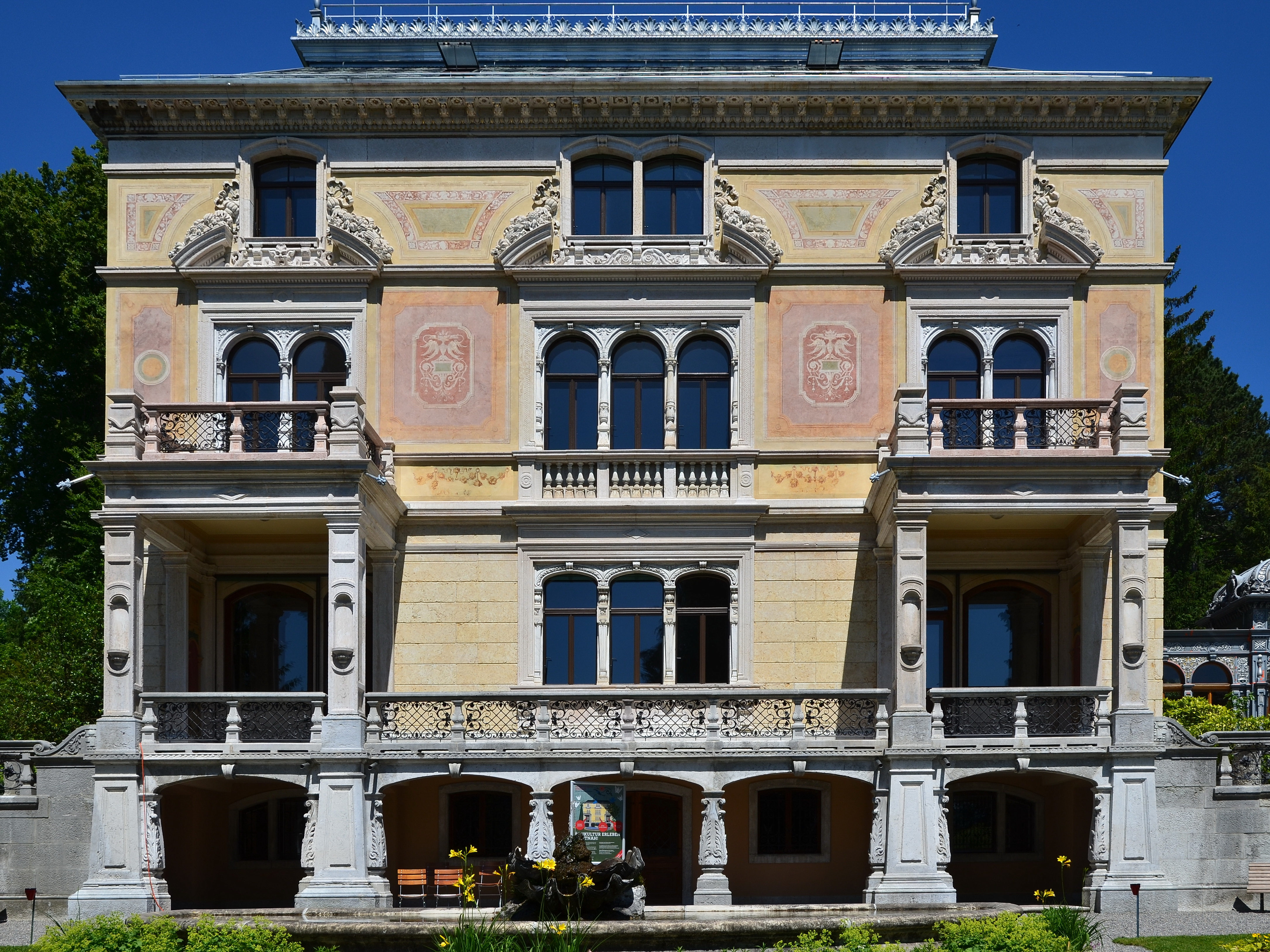 Villa Patumbah in Zürich-Mühlebach (Switzerland)